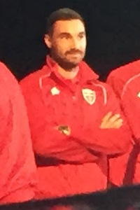 Marco Fossati durante la presentazione della squadra dell'A.C. Monza nel 2019.